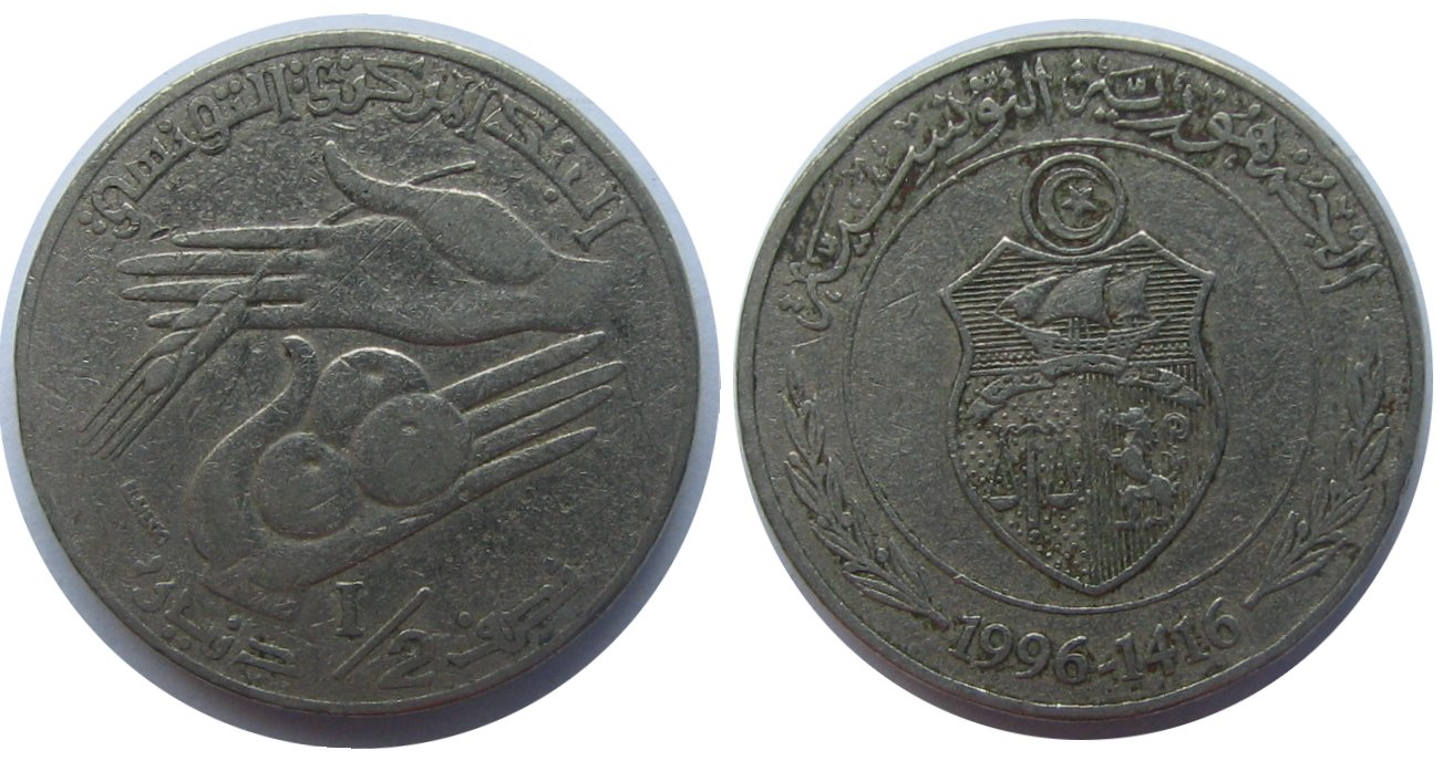 500 milim (1/2 dinara Tunezyjskiego)